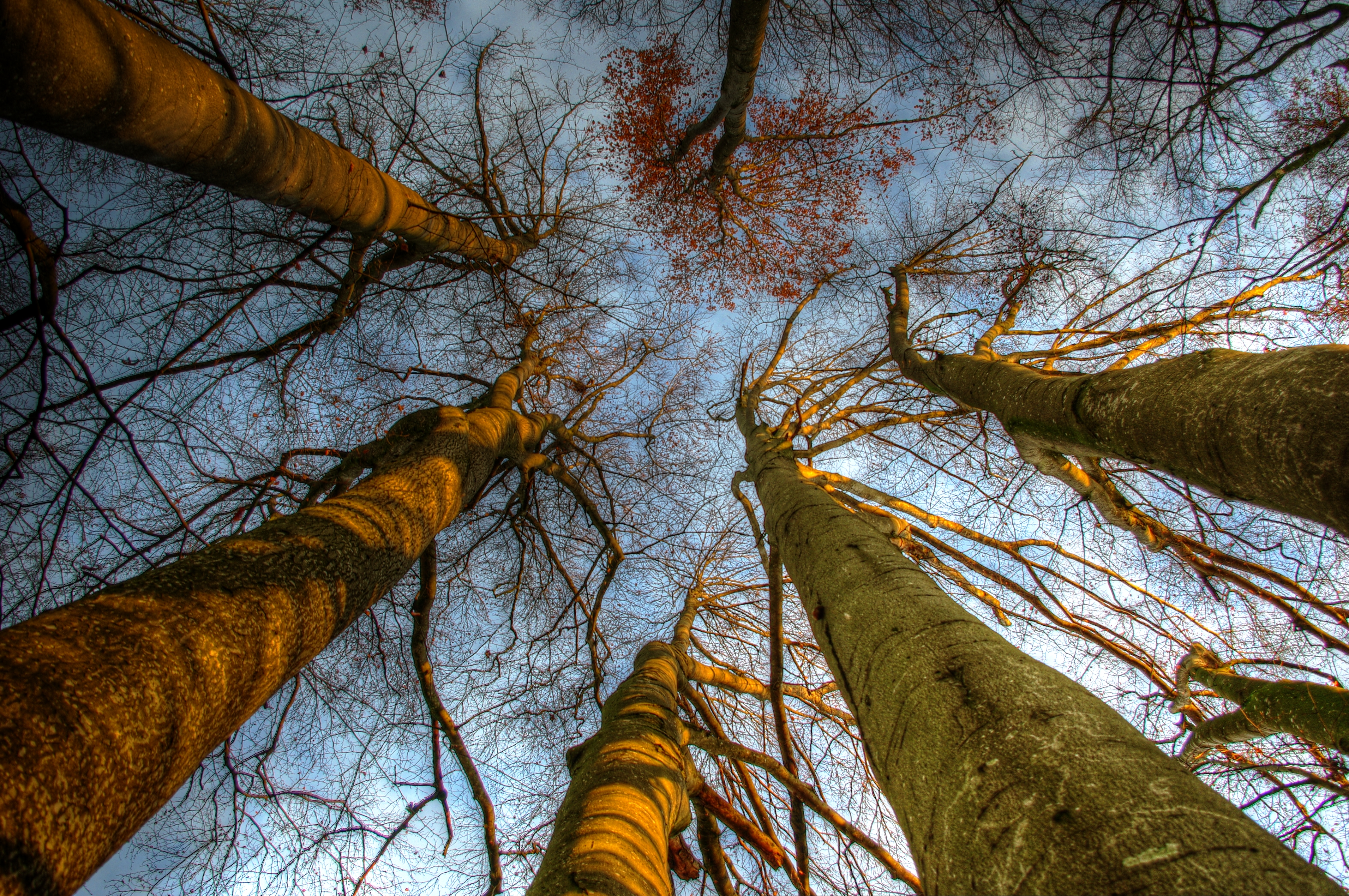 Das Laub ist fast schon alles abgefallen. Im Schloßpark in Schönau stehen viele alte Bäume.